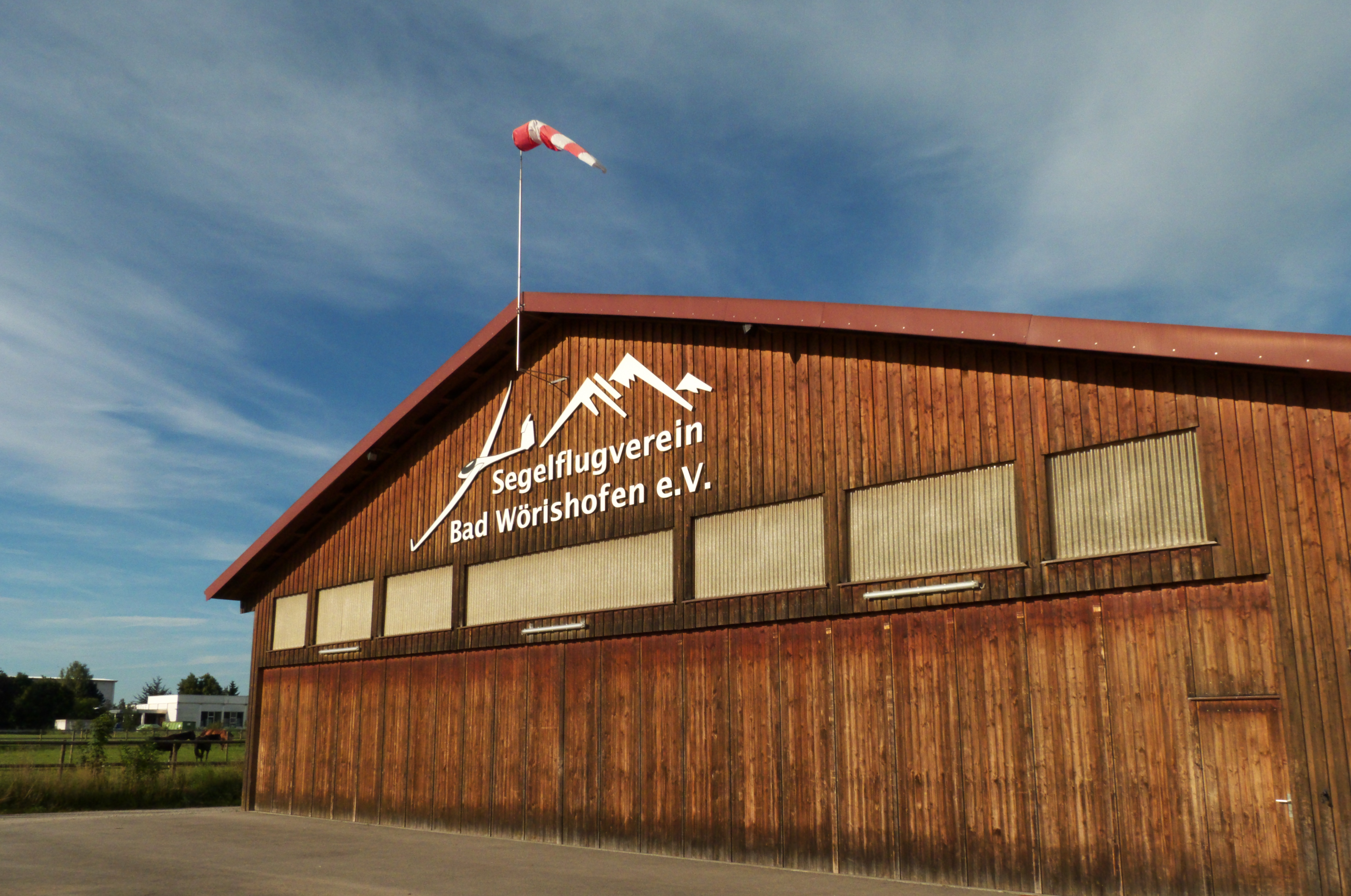 Bad Wörishofen